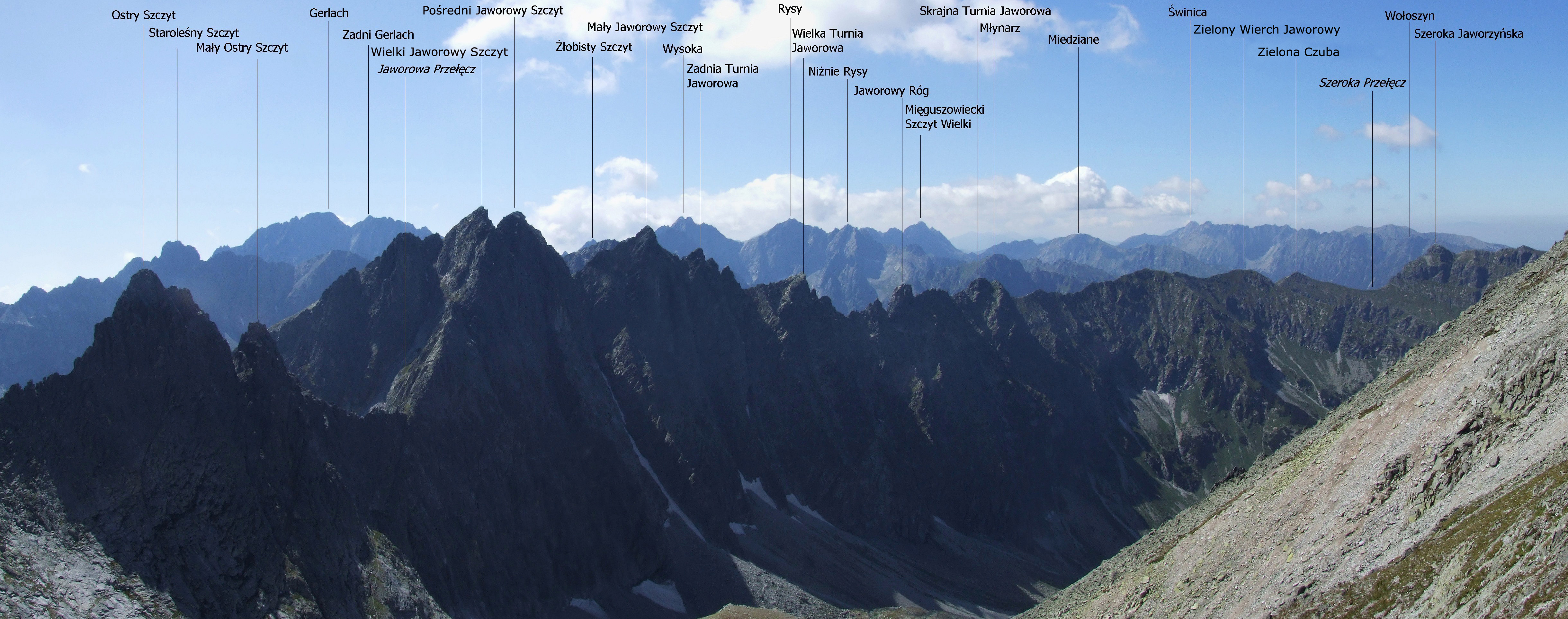 Panorama z Lodowej Przełęczy